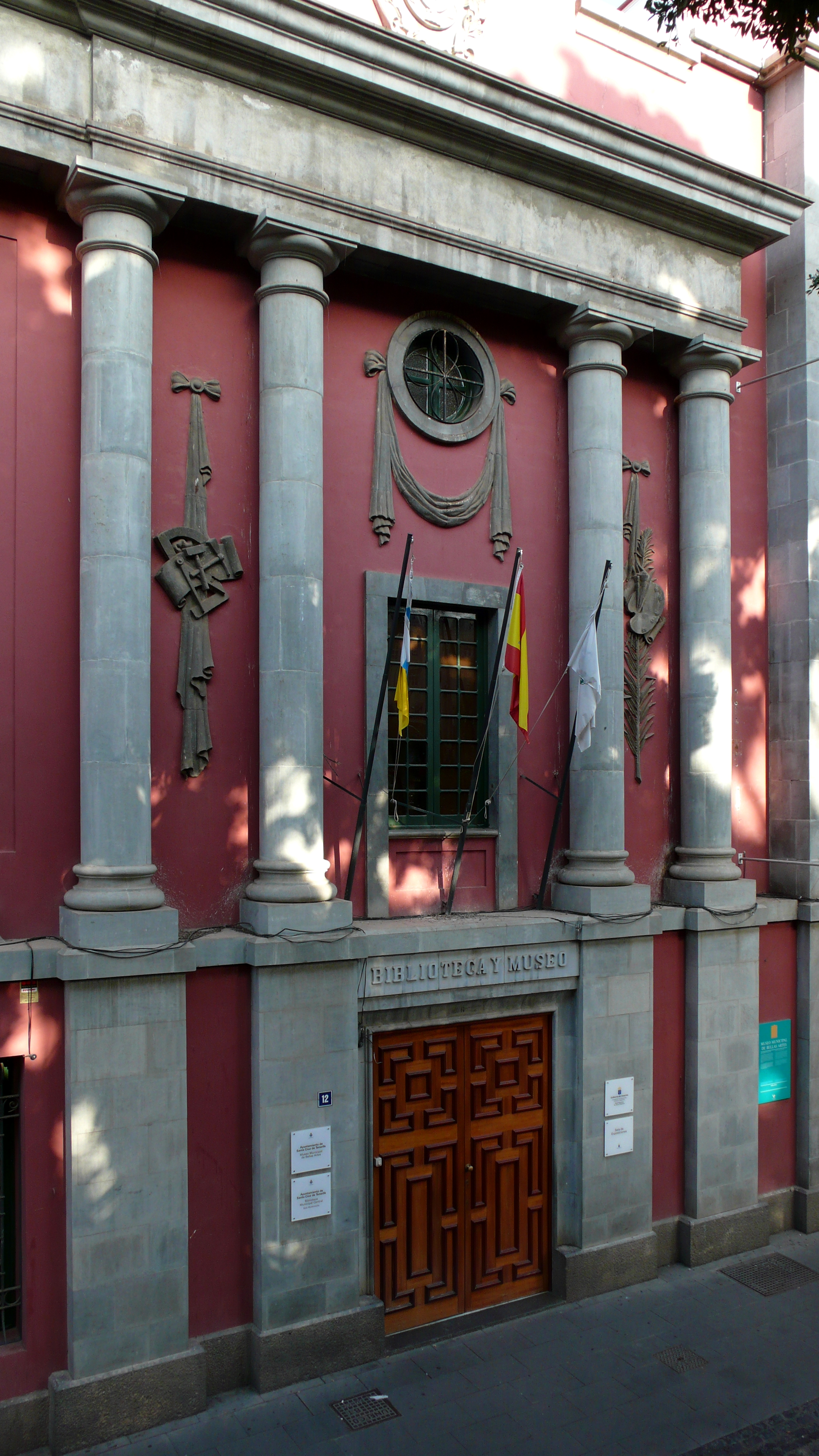 Fachada del Museo Municipal de Bellas Artes. Santa Cruz de Tenerife, Islas Canarias.